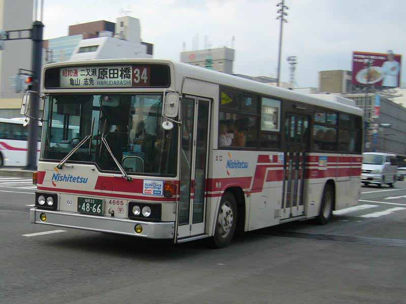 登録番号：福岡22か48-66 西日本鉄道宇美自動車営業所所属 car no.4665